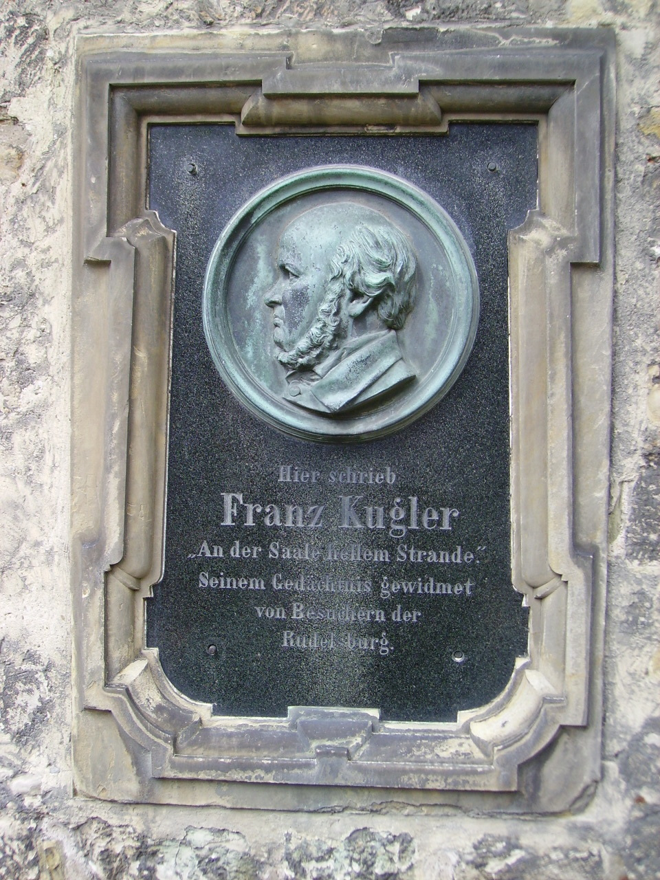 Tafel der Franz Kugler auf der Rudelsburg